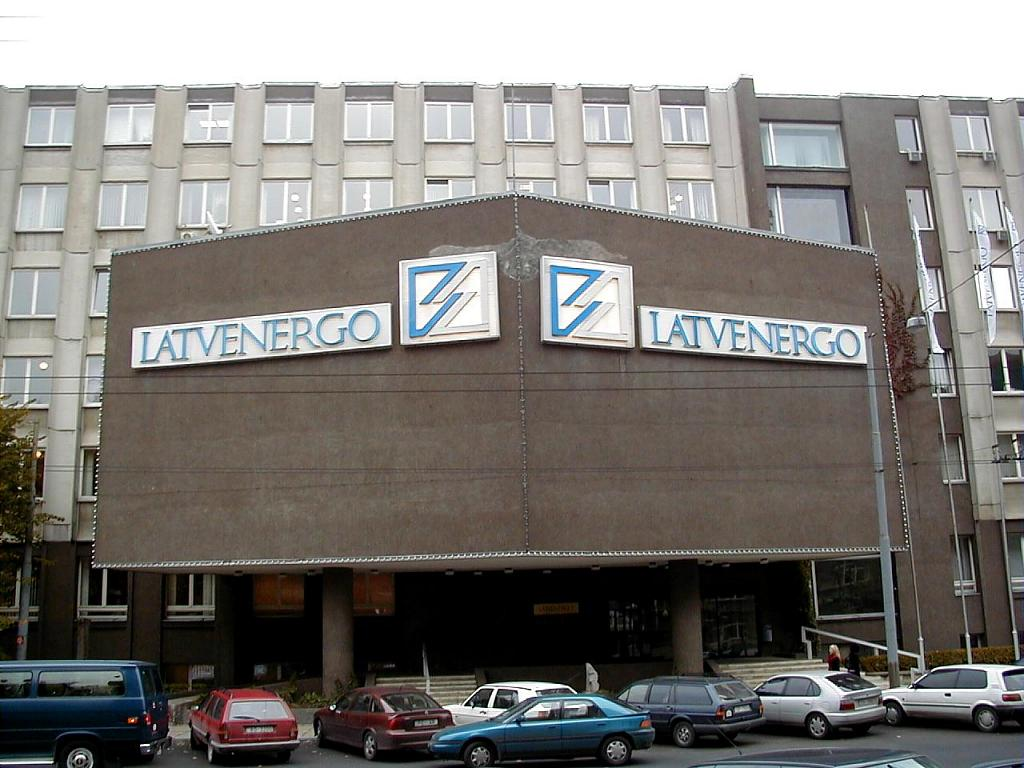 Rīga, Latvenergo 2002-10-14